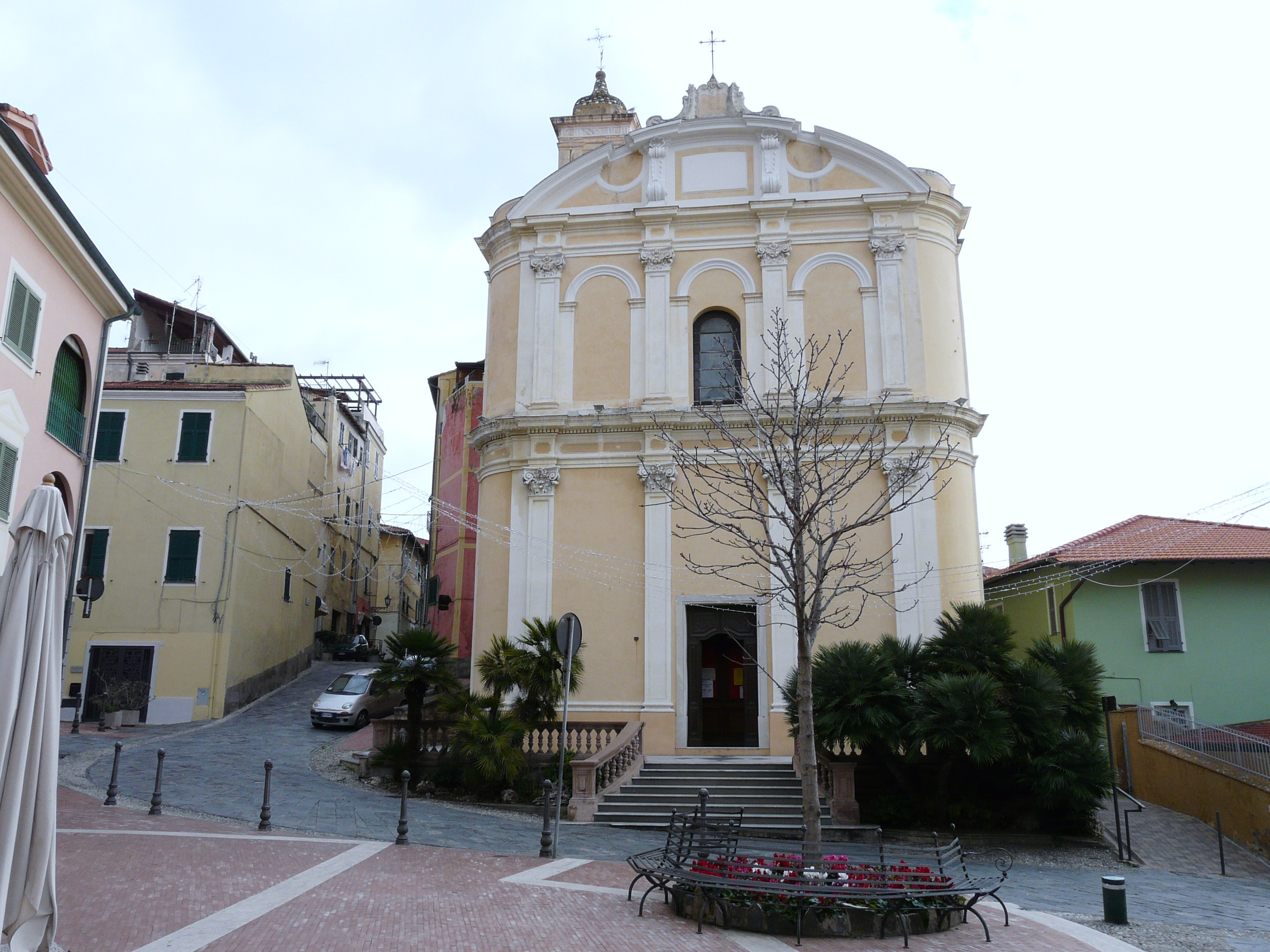 Chiesa di San Giovanni Battista, Ospedaletti, Liguria, Italia